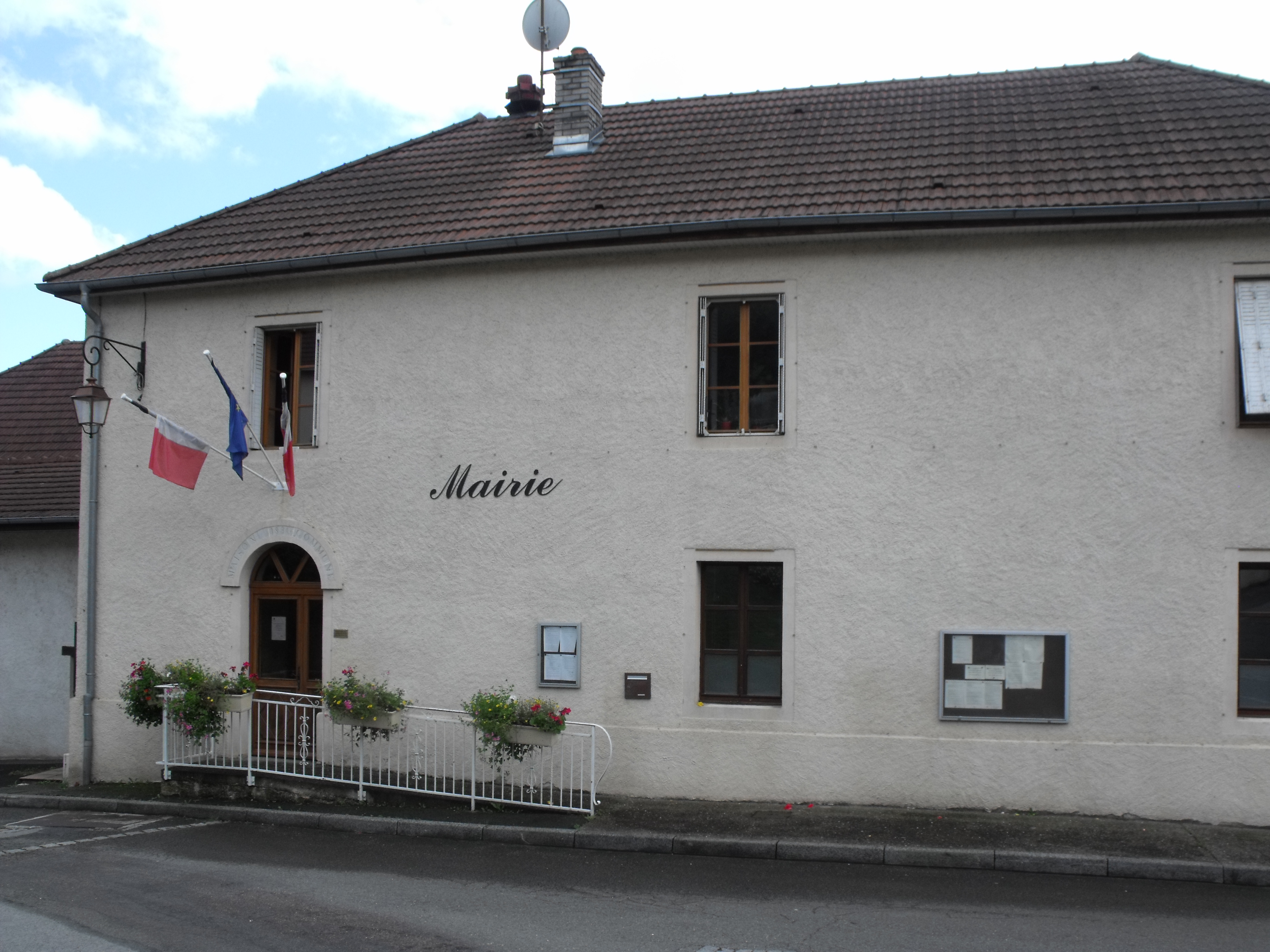 Mairie de Longevelle Sur Doubs, Doubs, France